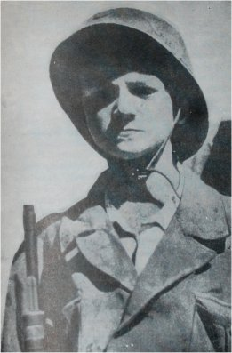 Witold Modelski "Warszawiak".